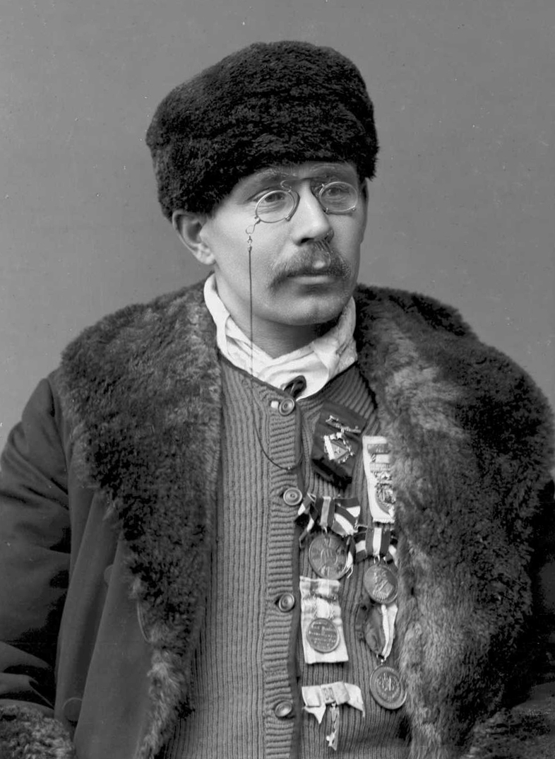 Axel Paulsen